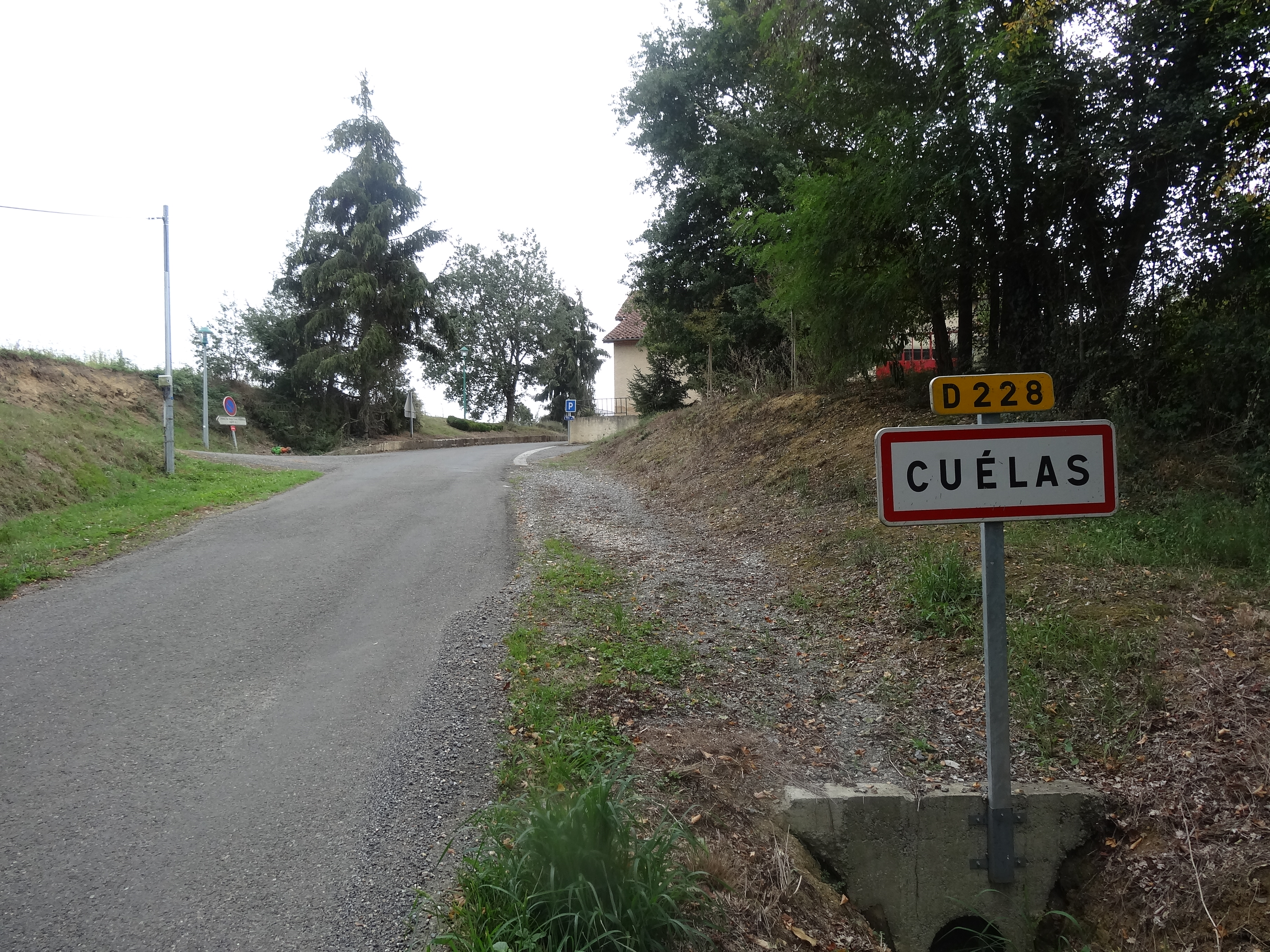 Entrée de Cuélas.